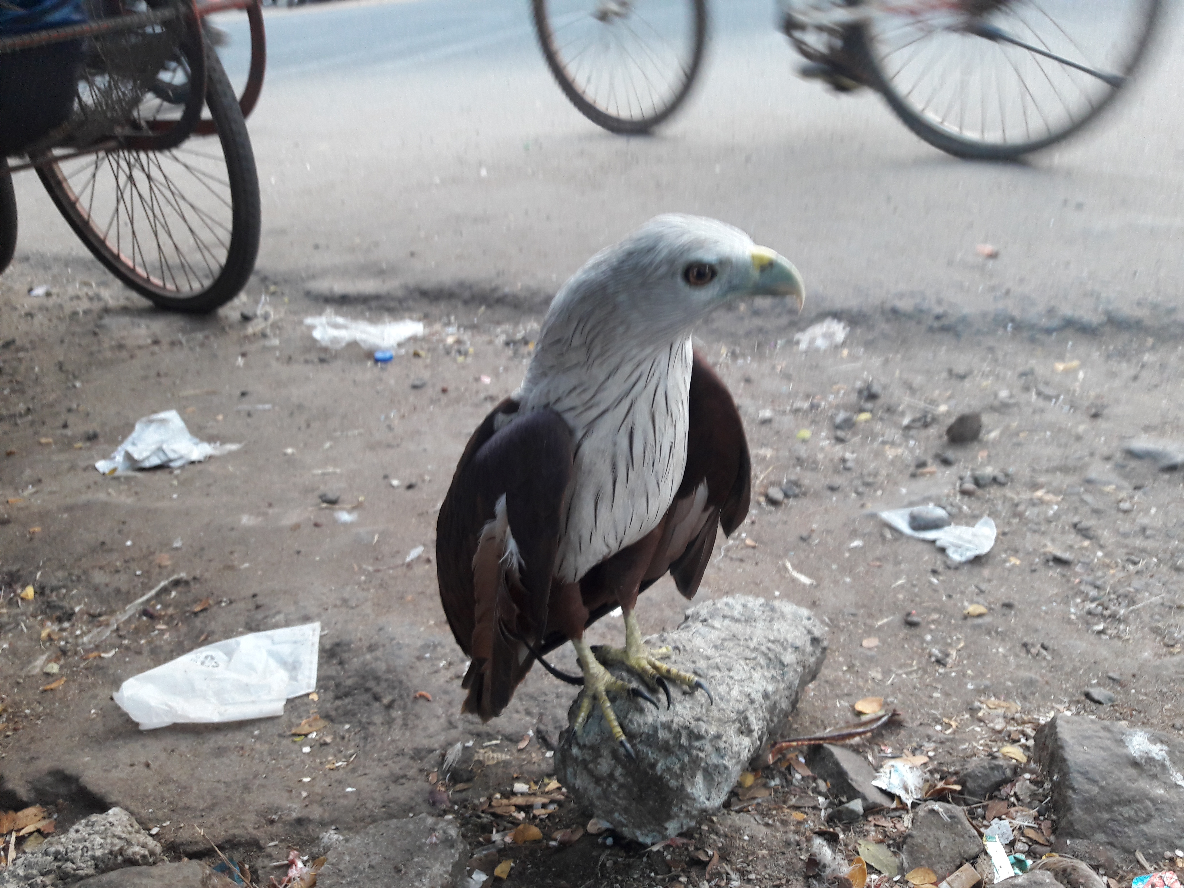 മലപ്പുറം ജില്ലയിലെ വെളിയംകോട് അങ്ങാടിയില്‍ ഒരു അറവുശാലയില്‍ വളര്‍ത്തുന്ന ഒരു പരുന്ത്.